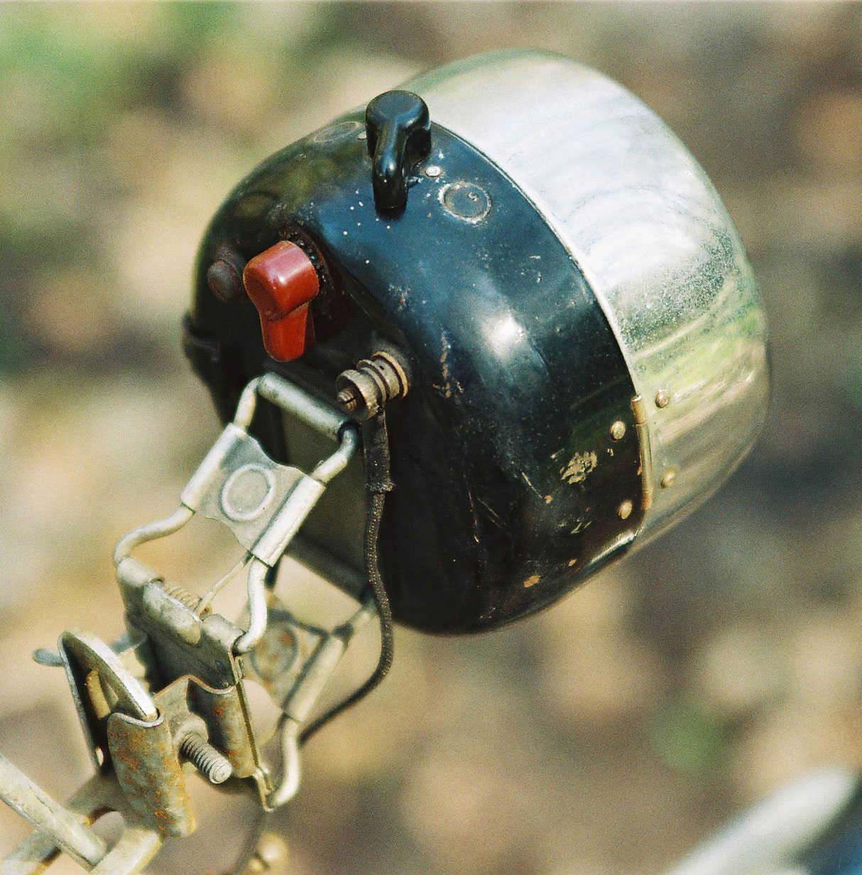 Opel- fahrrad baujahr 1935 mit Doppelschleifen- Rohrrahmen